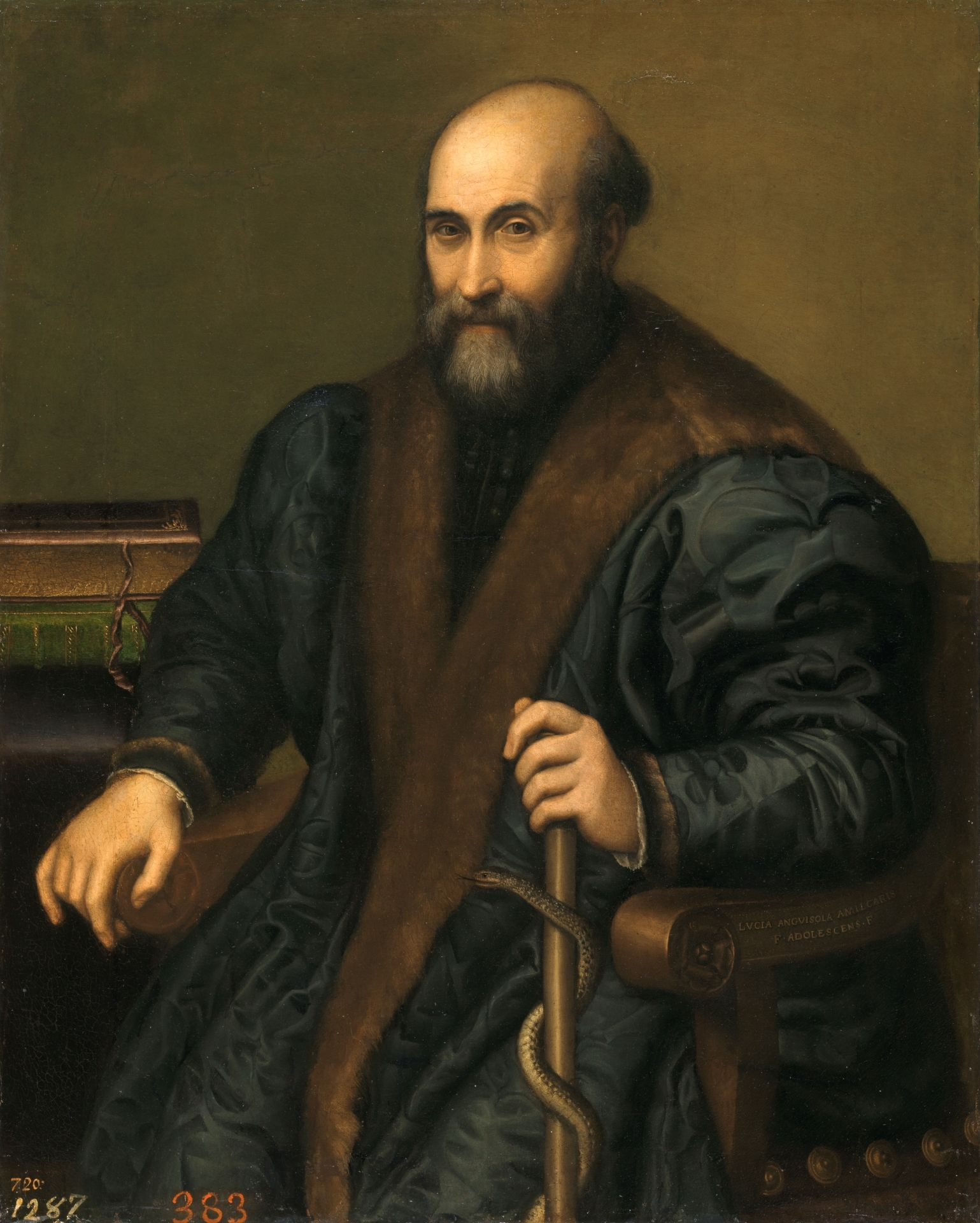 Pietro Manna, médico de Cremona, 1557, Alto: 96 cm.; Ancho: 76 cm. Técnica: Óleo. Soporte: Lienzo. Colección Real (Palacio Real Nuevo, Madrid, pieza interior triangulada, 1747, nº 383; Palacio del Buen Retiro, Madrid, cuarto del infante don Luis-pinturas apeadas, 1772, nº 383; Buen Retiro, 1794, nº 1287).